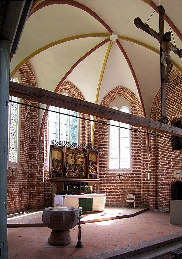 Kirche in Retgendorf, Chor mit Altar und Fünte, Landkreis Parchim